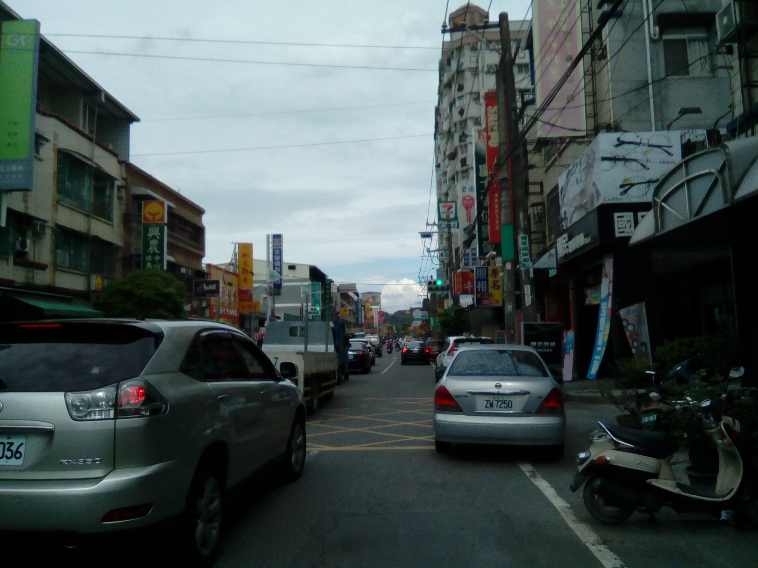 由大社區中山路&翠屏路口一帶往東拍攝